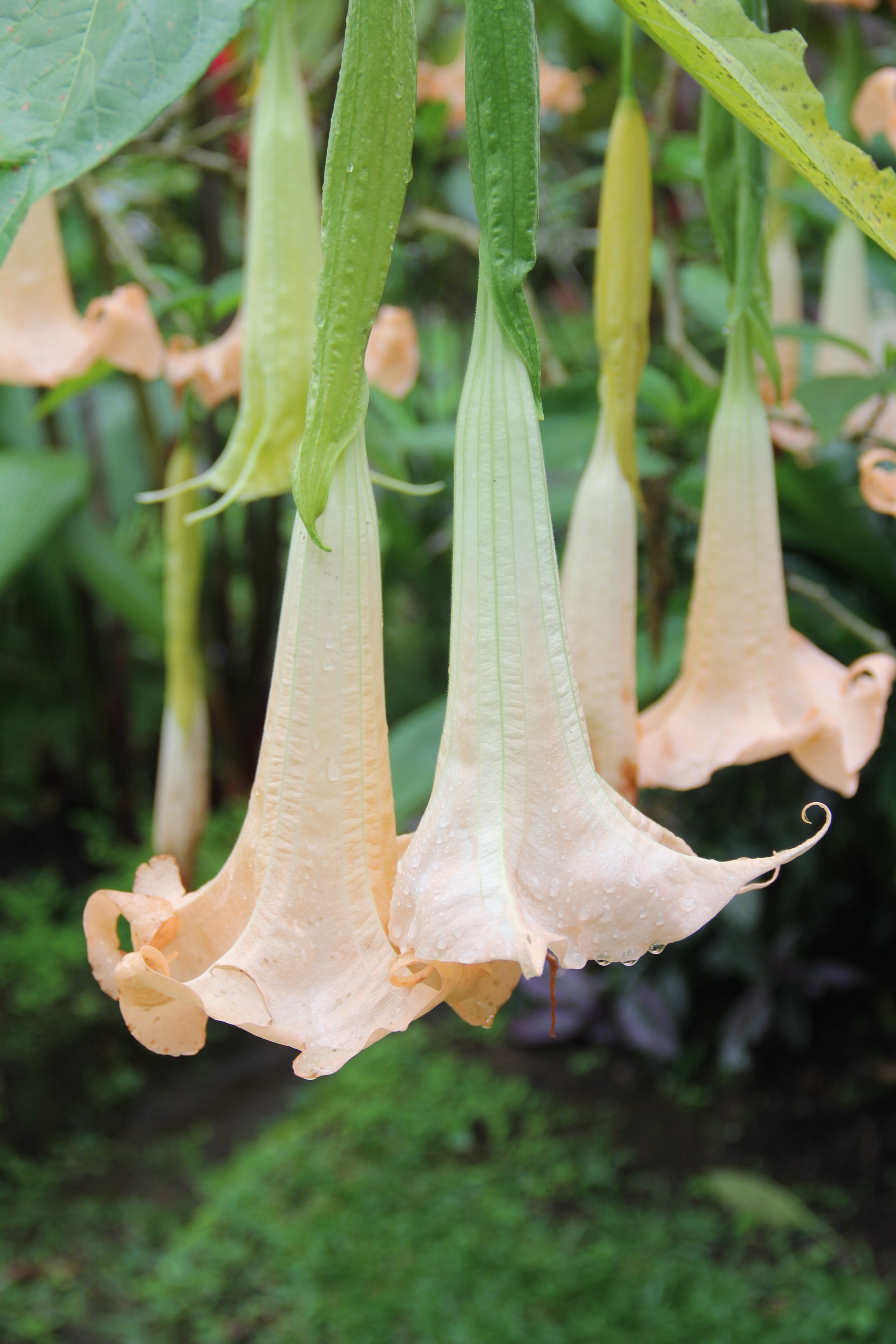 Brugmansia arborea (Datura arborea)